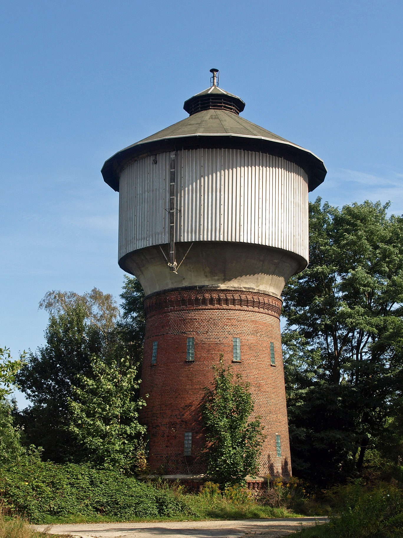 Wasserturm auf dem Gelände des Rangierbahnhofes Schlauroth (Görlitz)